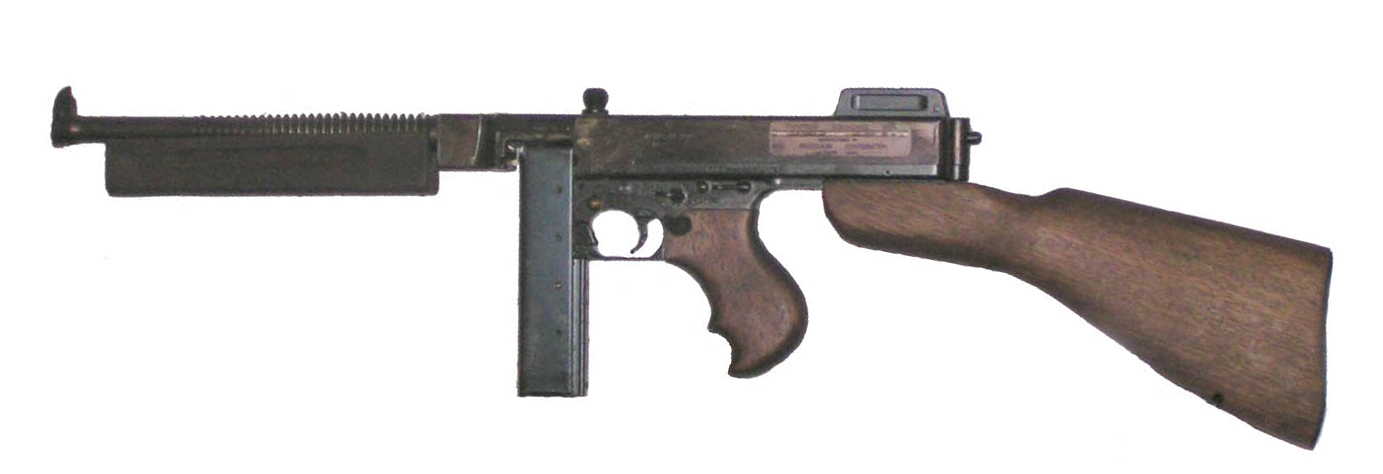 Maschinenpistole Thompson 1928A1